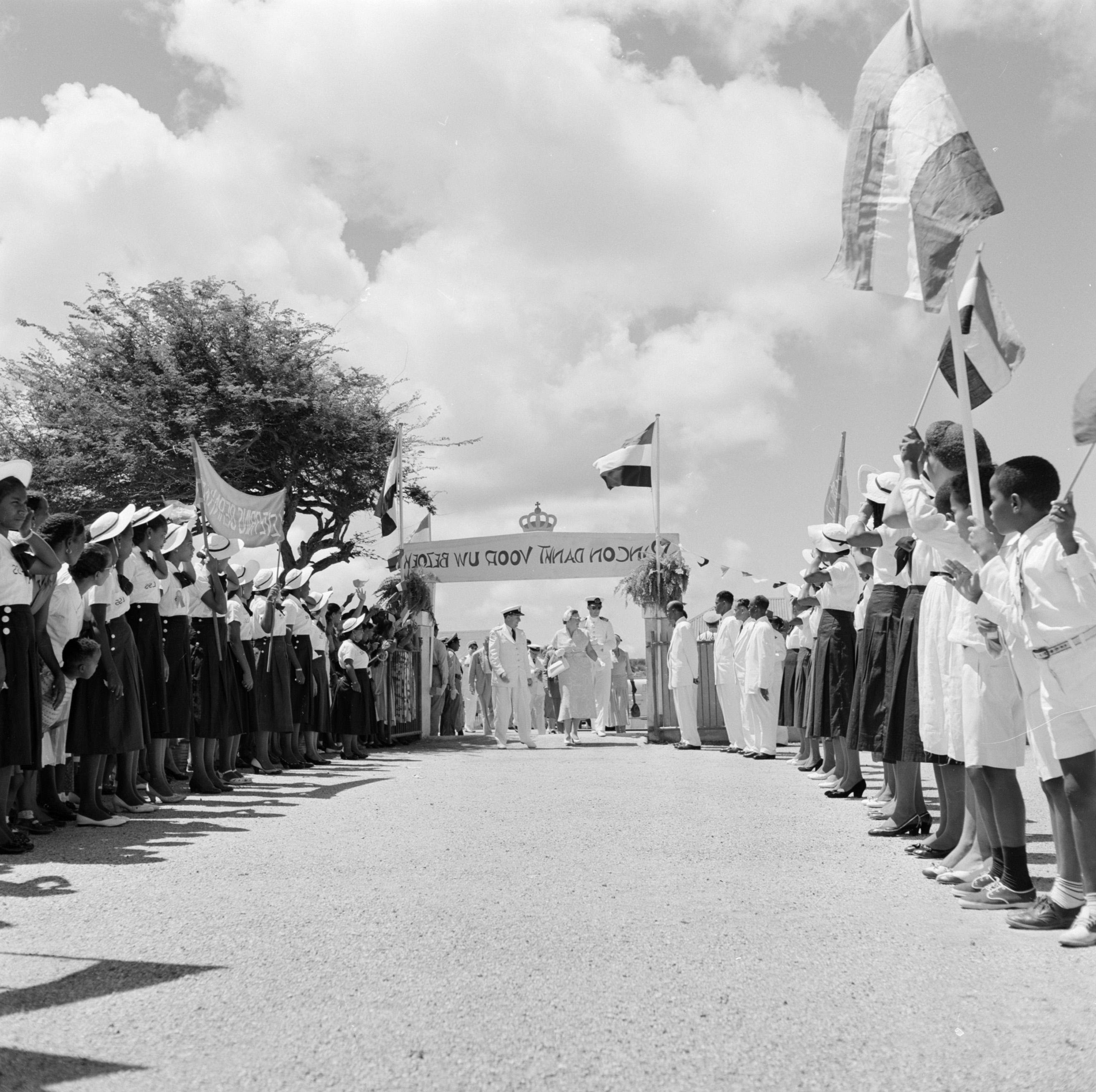 Collectie / Archief : Fotocollectie Van de Poll Reportage / Serie : Nederlandse Antillen en Suriname ten tijde van het koninklijk bezoek van koningin Juliana en prins Bernhard in 1955 Beschrijving : Het koninklijk paar bezoekt Rincón op Bonaire Annotatie : Het opschrift op het spandoek luidt: Rincón dankt voor uw bezoek Datum : 23 oktober 1955 Locatie : Bonaire, Nederlandse Antillen, Rincón Trefwoorden : kinderen, koninklijk bezoeken Persoonsnaam : Bernhard, prins, Juliana, koningin Fotograaf : Poll, Willem van de Auteursrechthebbende : Nationaal Archief Materiaalsoort : Negatief (zwart/wit) Nummer archiefinventaris : bekijk toegang 2.24.14.02 Bestanddeelnummer : 252-3852